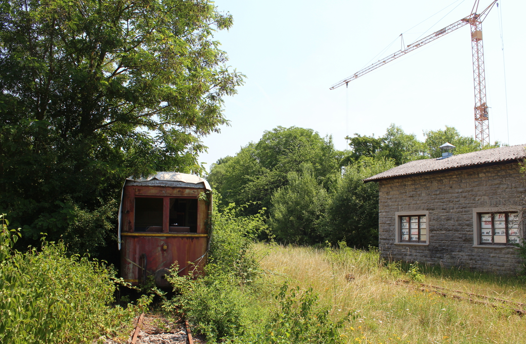 RSE TA4/TA5 in Bieringen, rechts im Lokschuppen der ex. RSE T5 in Unterstellung (2015)